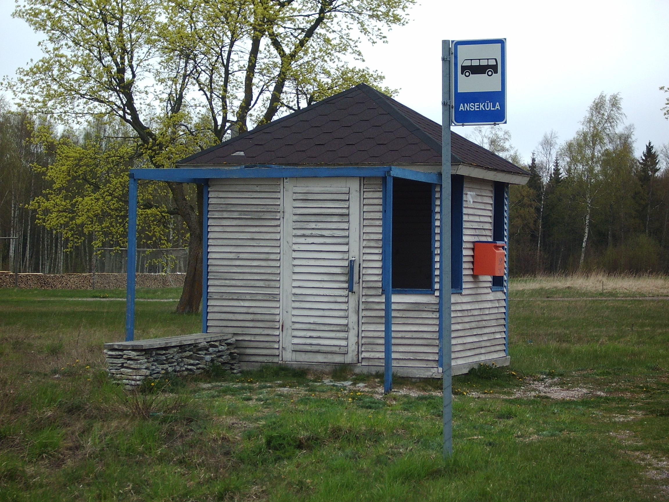 Bussipeatus ja bussiootepaviljoni seinal postkast Ansekülas Saare maakonnas